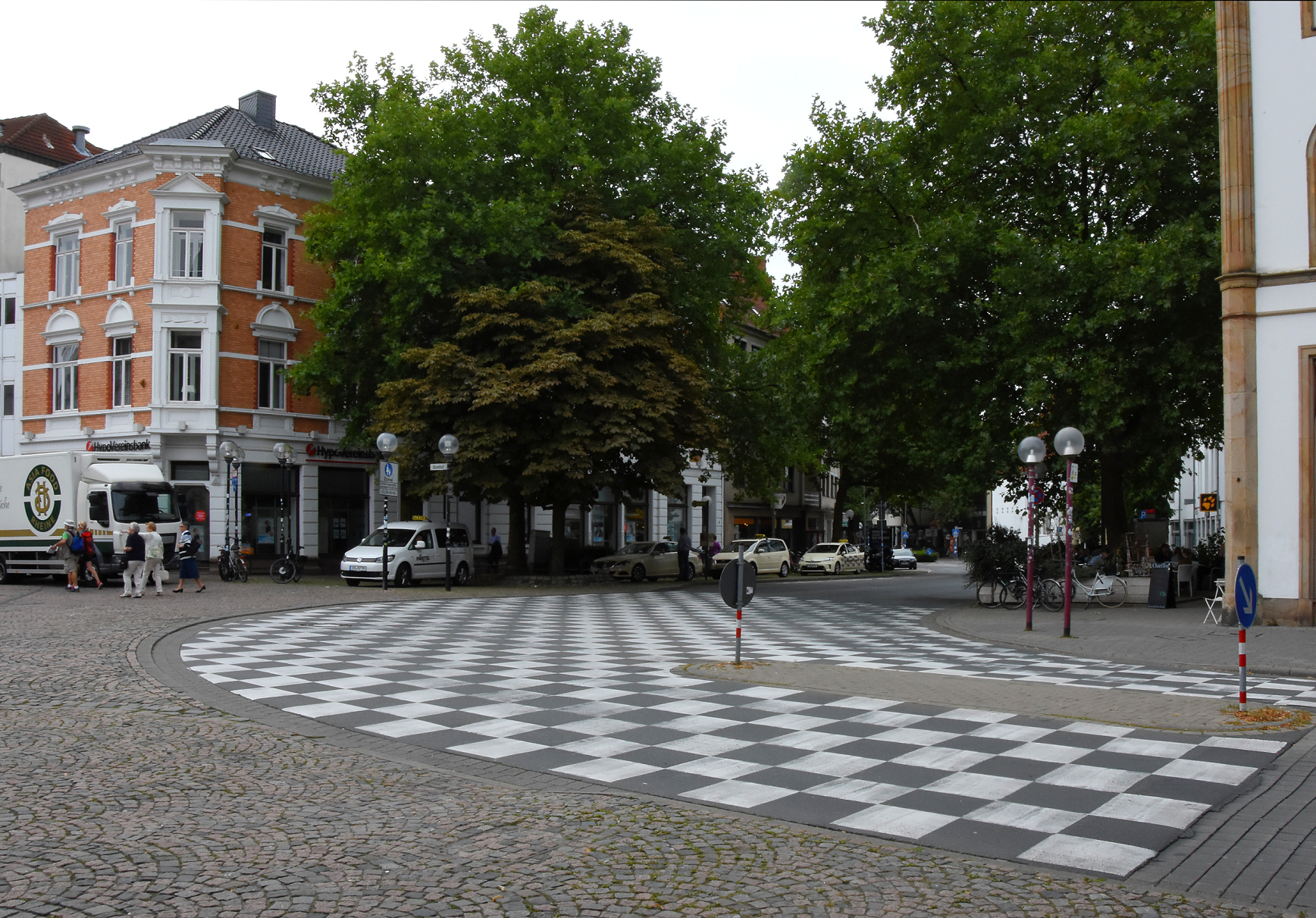 „Falscher Zebrastreifen“ am Platz der Deutschen Einheit in Osnabrück an der Ecke Domhof/Lortzingstraße. Dieses Schachbrettmuster hat zwar keine reale regulatorische Bedeutung für den Straßenverkehr, erfüllte aber trotzdem die Erwartung, die zuvor hohe Anzahl von Unfällen mit Fußgängerbeteiligung an dieser Ecke deutlich zu senken.